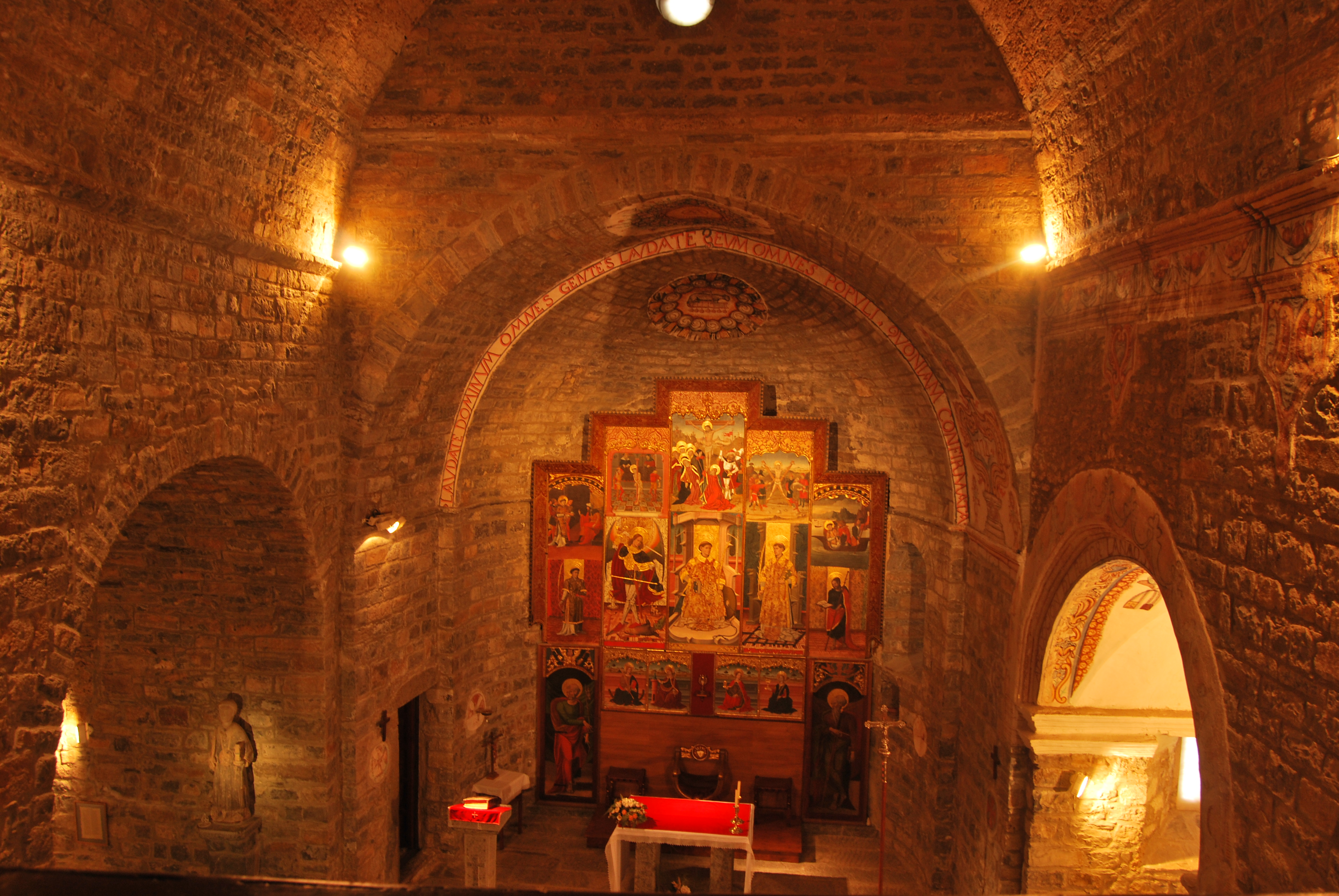 Interior de la iglesia de San Vicente de Labuerda. Comarca de Sobrarbe